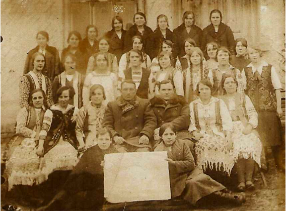 Осередок «Союзу українок», 1933р. Головою осередку була Павлюк-Гуменюк Ганна Миколаївна.